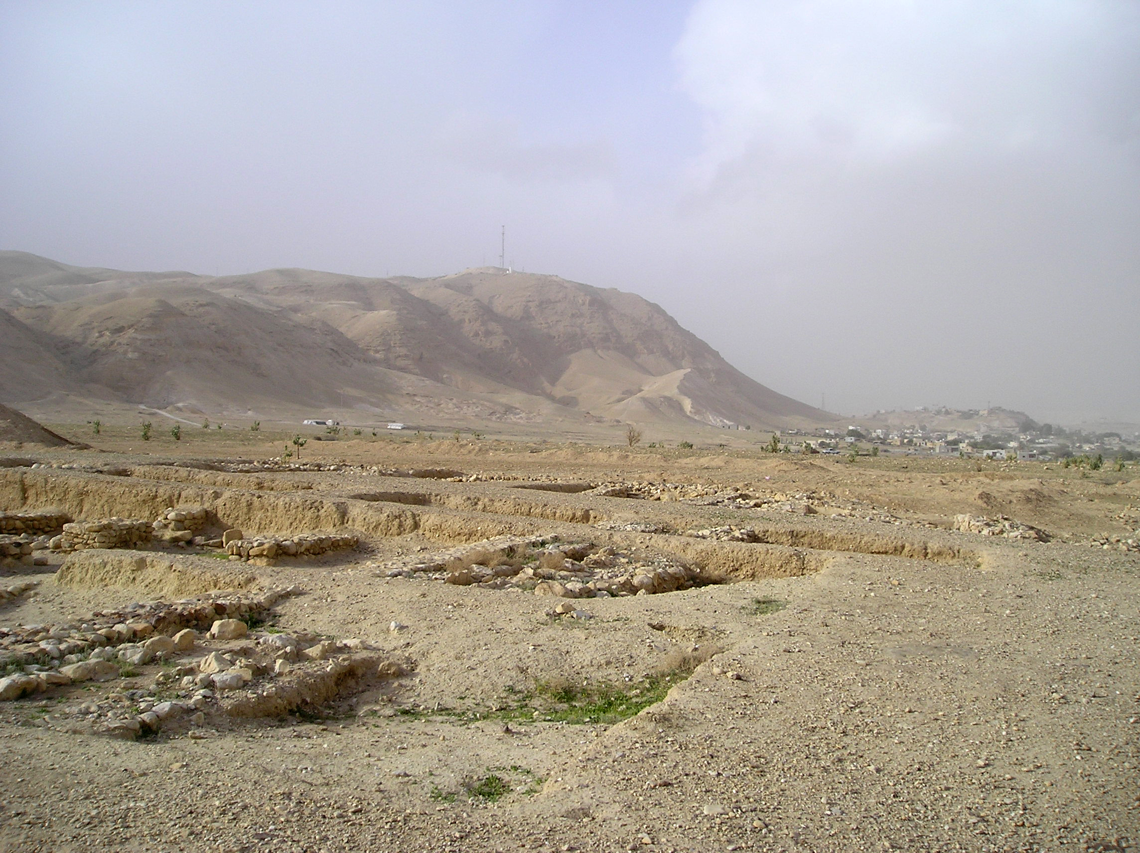 Widok z Jerycha herodiańskiego (Autonomia Palestyńska) na Górę Kuszenia (Dżabal Quruntul). Zdjęcie wykonał A. Sobkowski dn. 9 marca 2006.